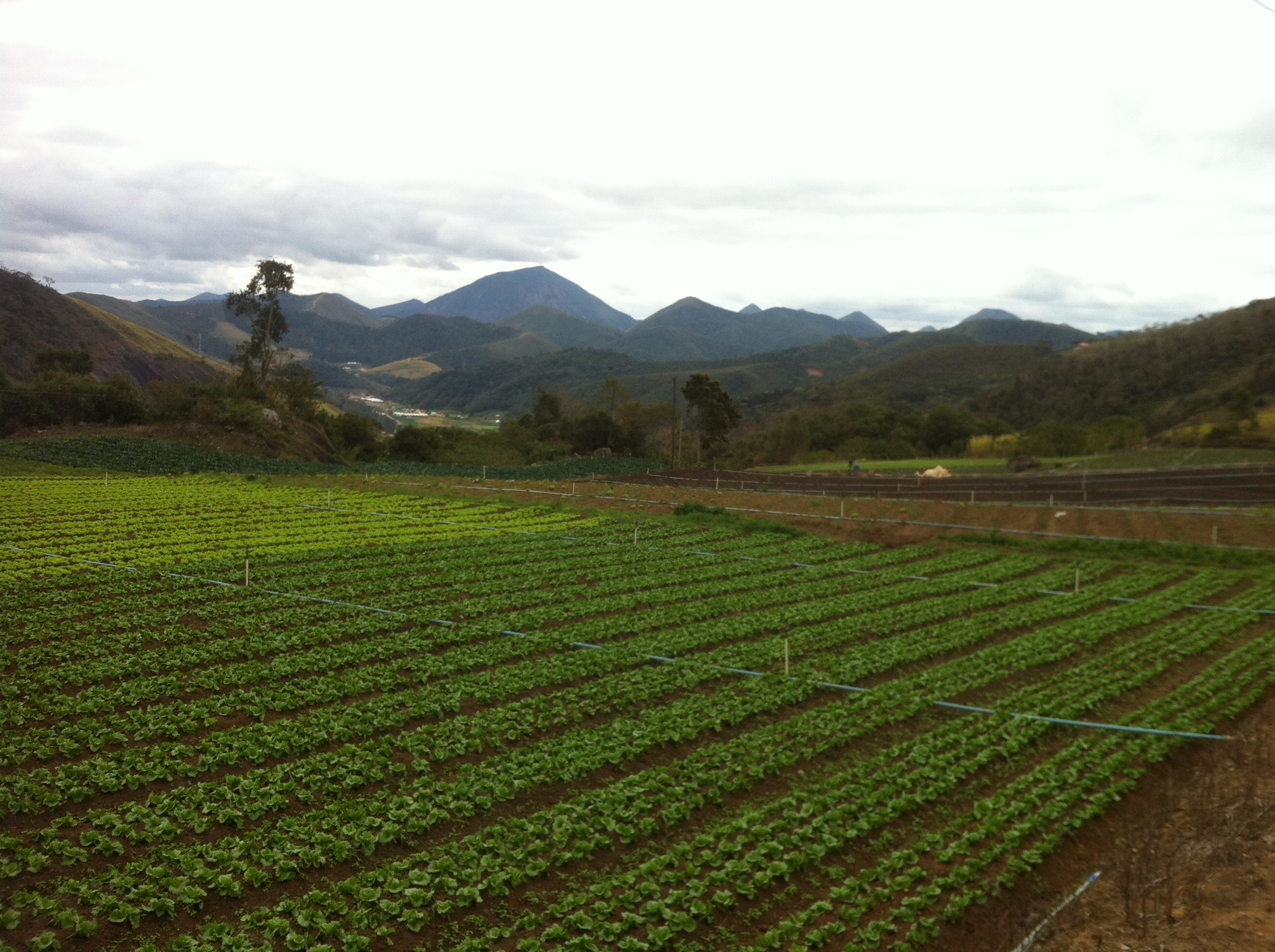 Salada